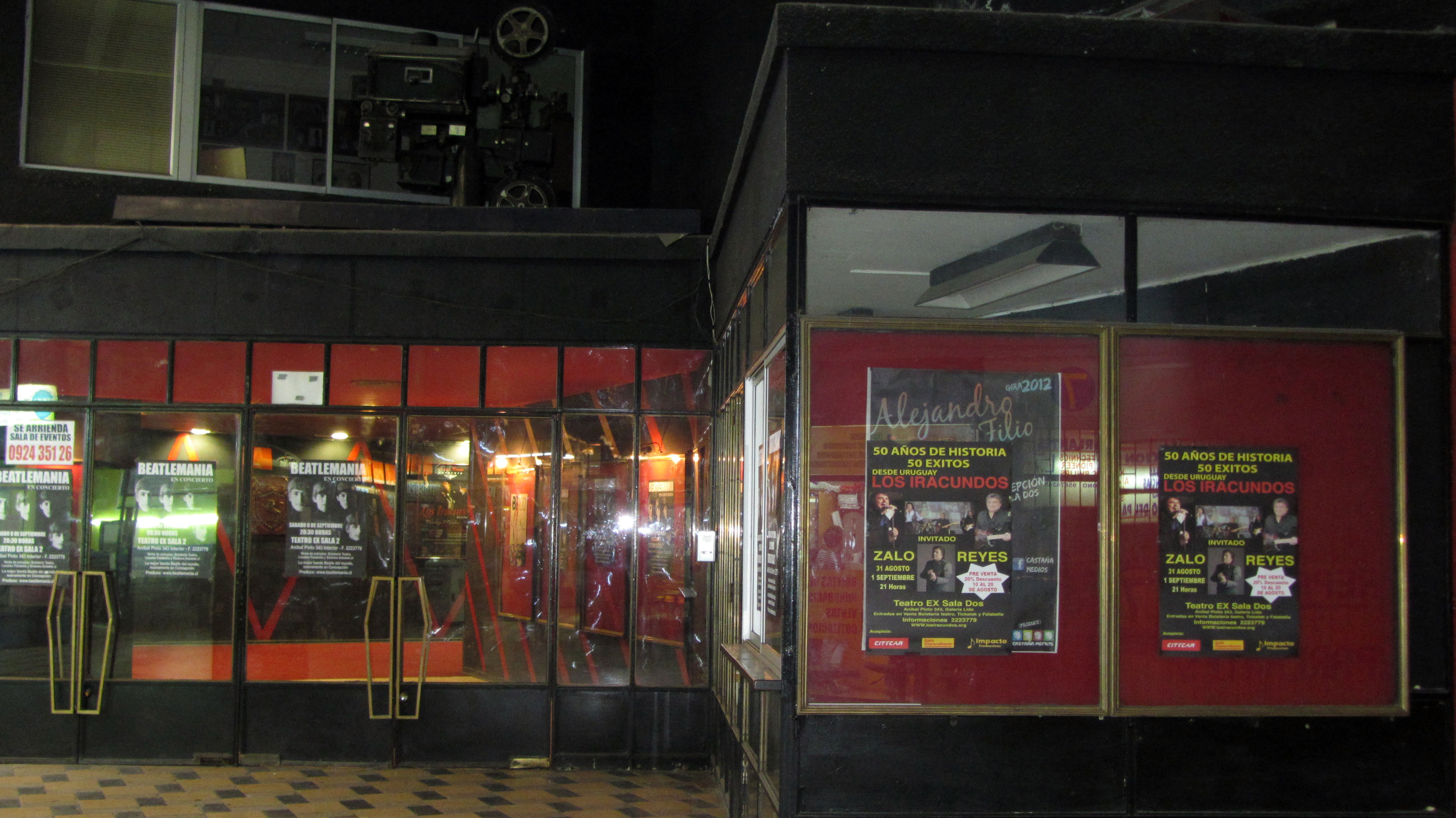 Entrada del Teatro Sala Dos Concepción, Chile Septiembre de 2012